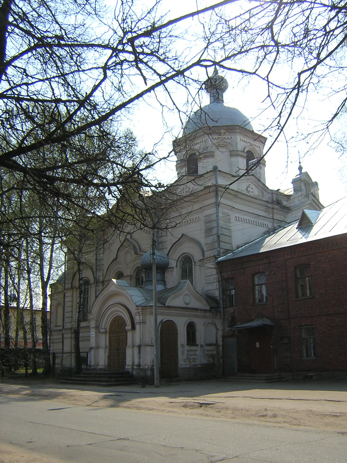 Собор Сошествия Святого Духа в Духовом монастыре. Великий Новгород